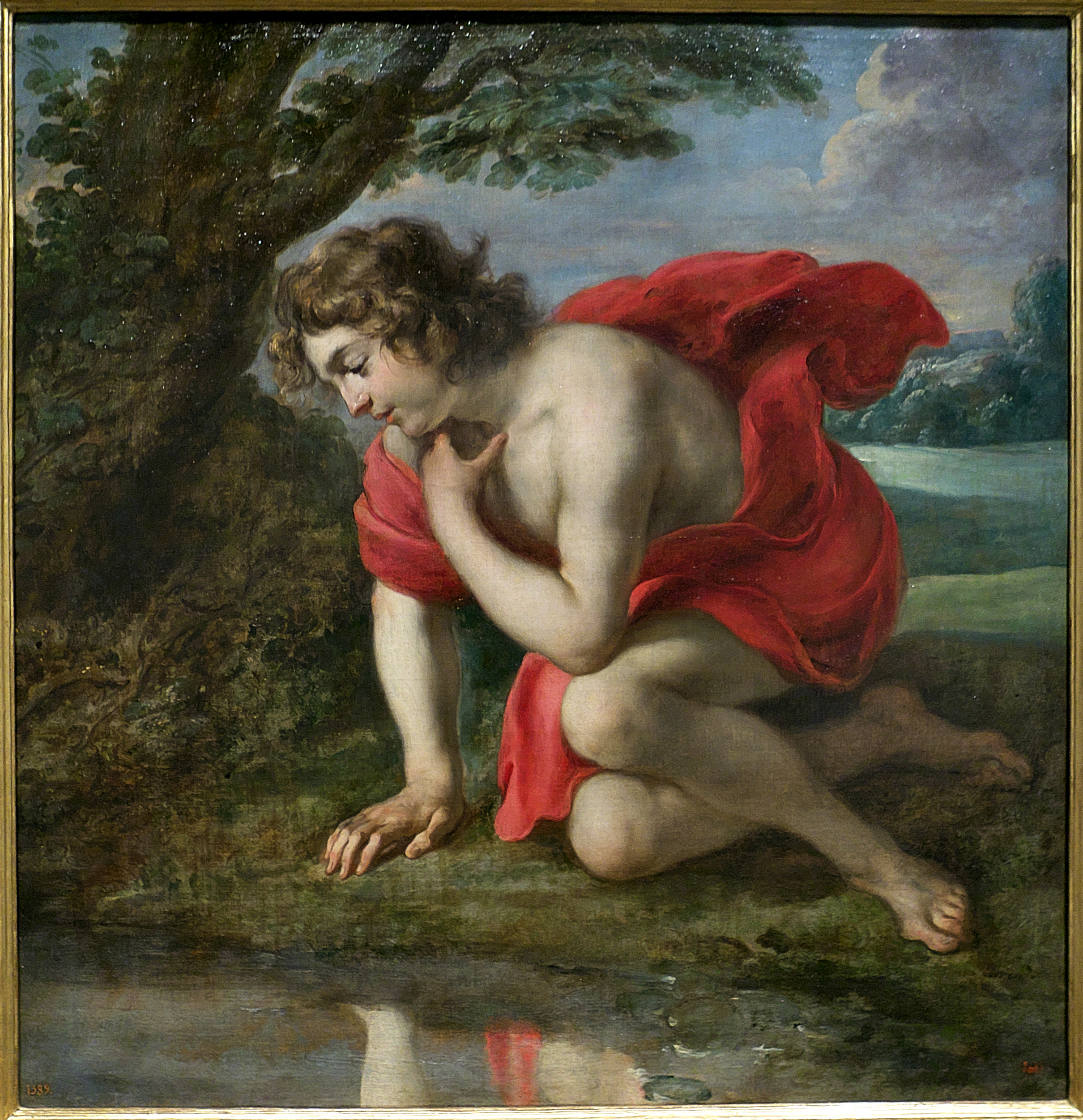 Narciso al verse reflejado en el agua, queda permanentemente extasiado y enamorado de sí mismo por su extraordinaria belleza. Morirá consumido de amor y transformado en flor. Éste es el castigo de los dioses por rechazar el amor de la ninfa Eco y causarle la muerte (Libro III de las Metamorfosis). Óleo sobre lienzo (1636-1638). Jan Cossiers modifica el boceto proporcionado por Rubens, existente en el Museo Boijmans Van Beuningen, pintura destinada a la decoración de la Torre de la Parada. Boceto de Rubens (1636), óleo sobre tabla (Róterdam)